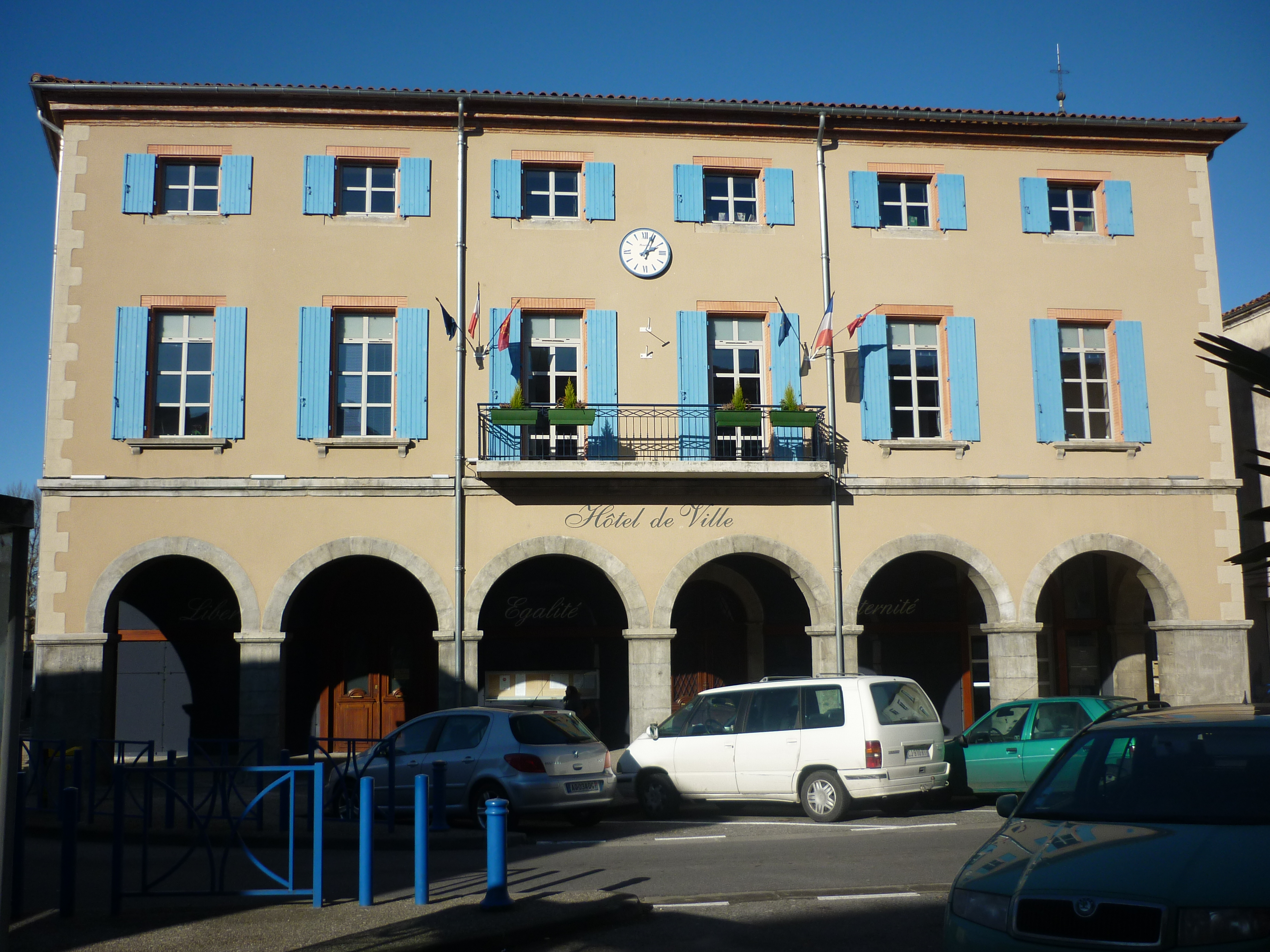 L'hôtel de ville de Varilhes (Ariège, Midi-Pyrénées, France).